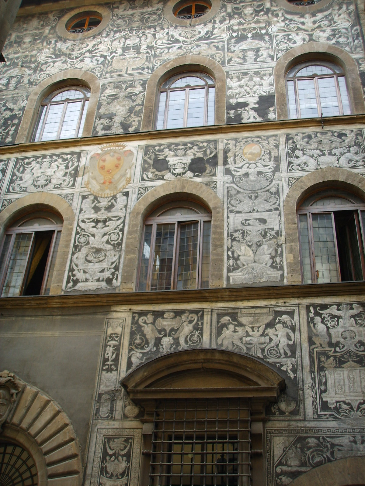 Palazzo di Bianca Cappello, Florence, Italy